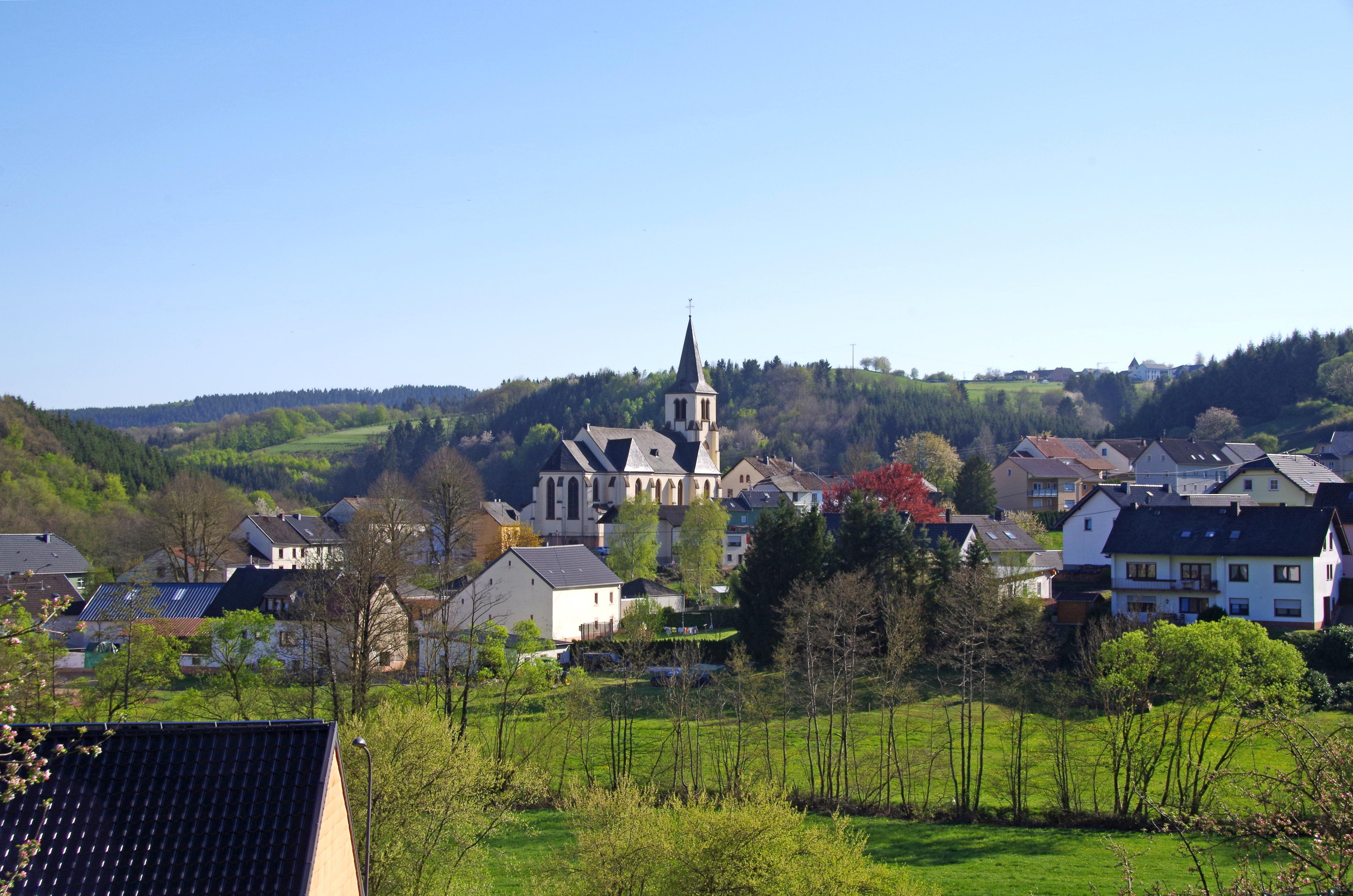 Lasel, Ortsansicht von Nordosten (Hasenberg)